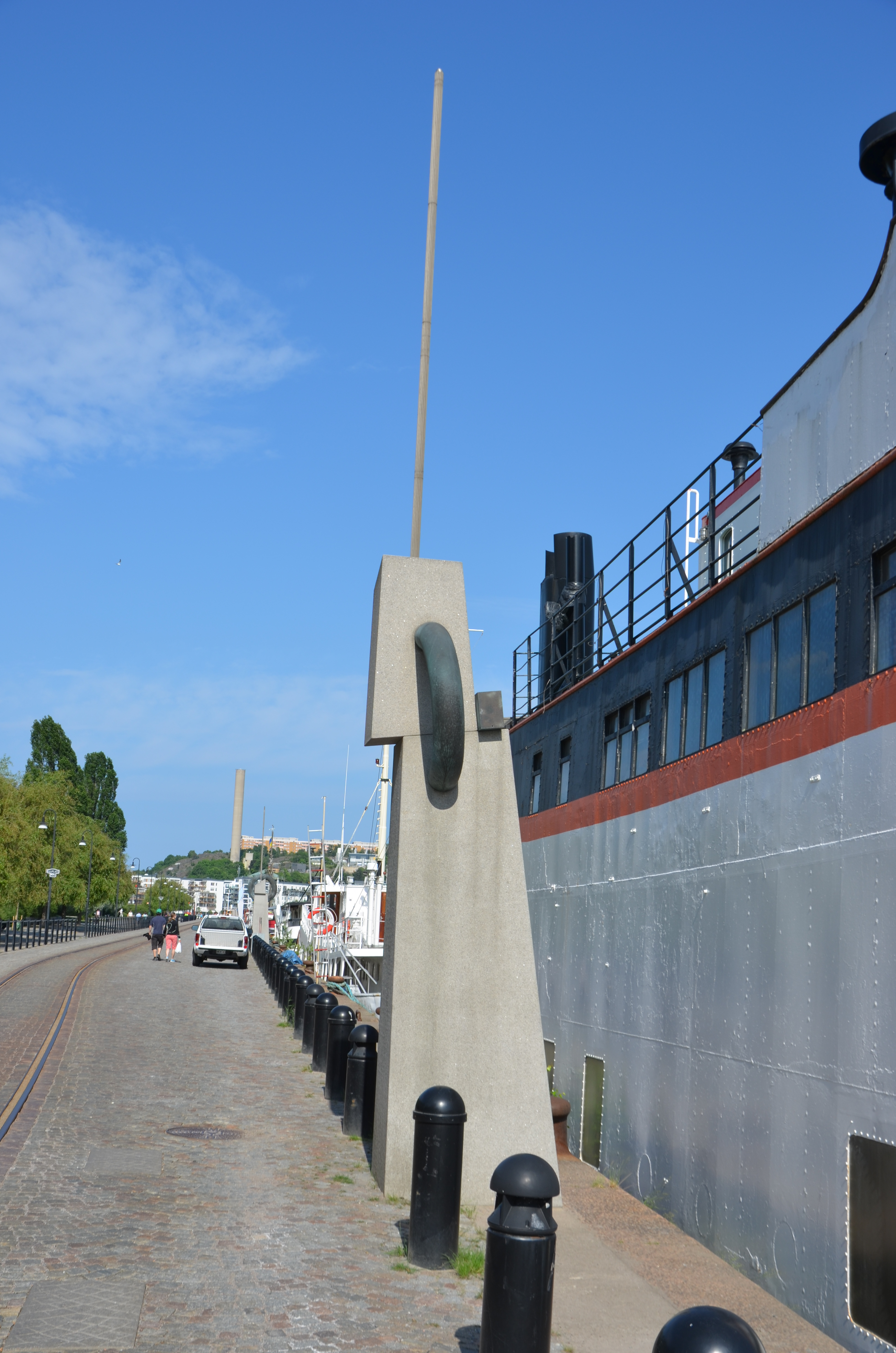 Freddy Fraeks F1, 1998, på kajen, Norra Hammarbyhamnen i Stockholm